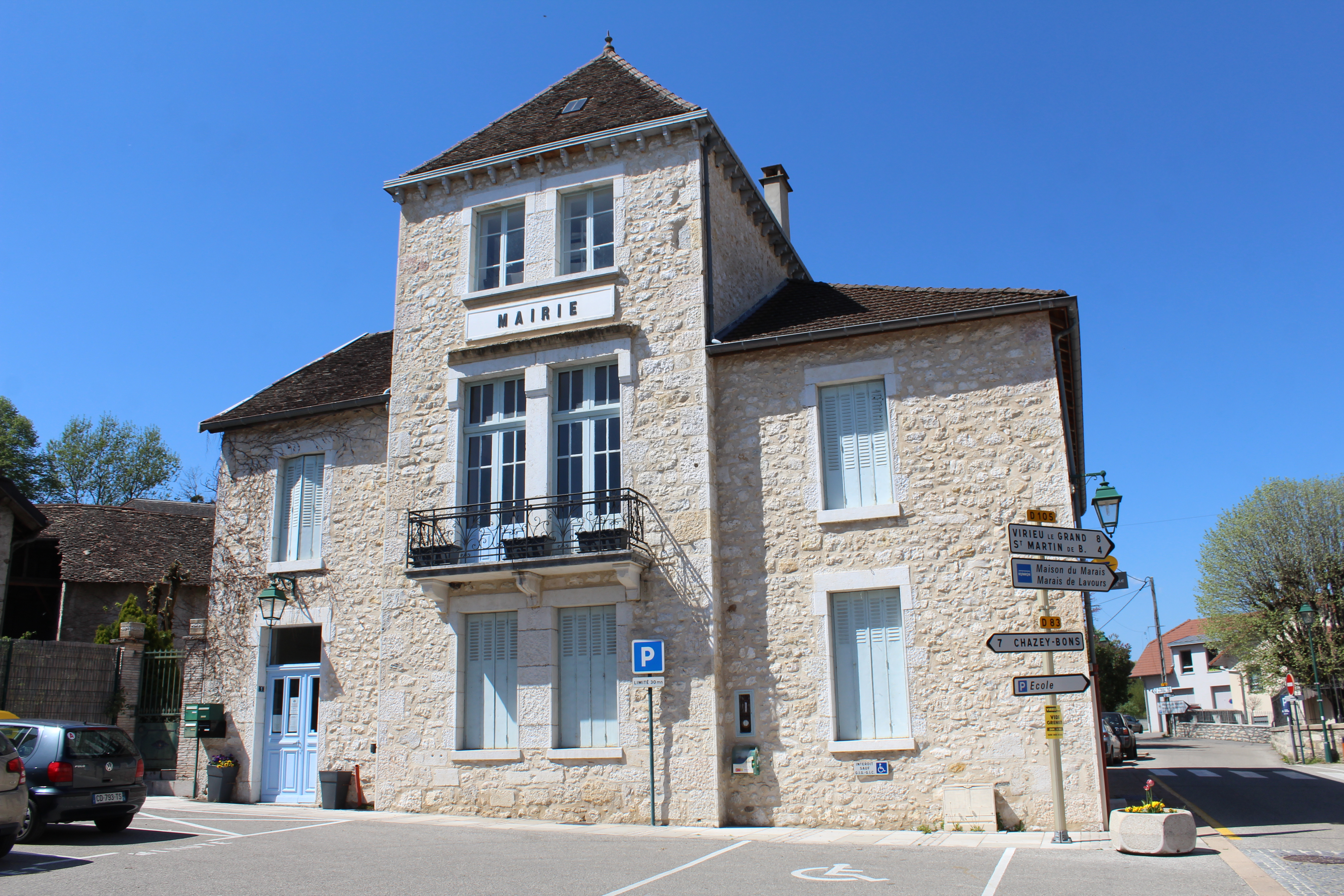 Mairie de Ceyzérieu.